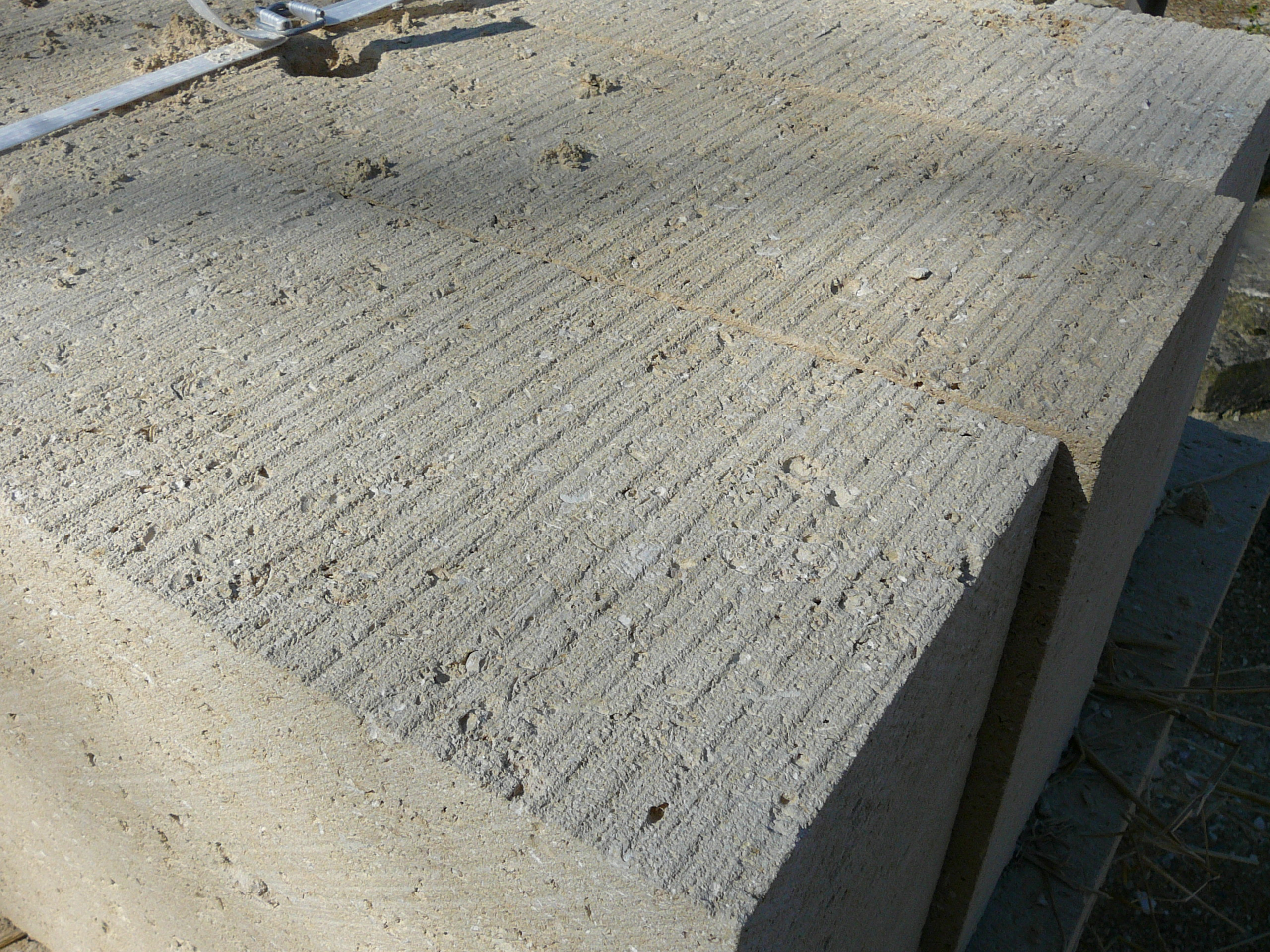 Roche à bâtir.Blocs de pierre calcaire, brut de sciage de carrière.